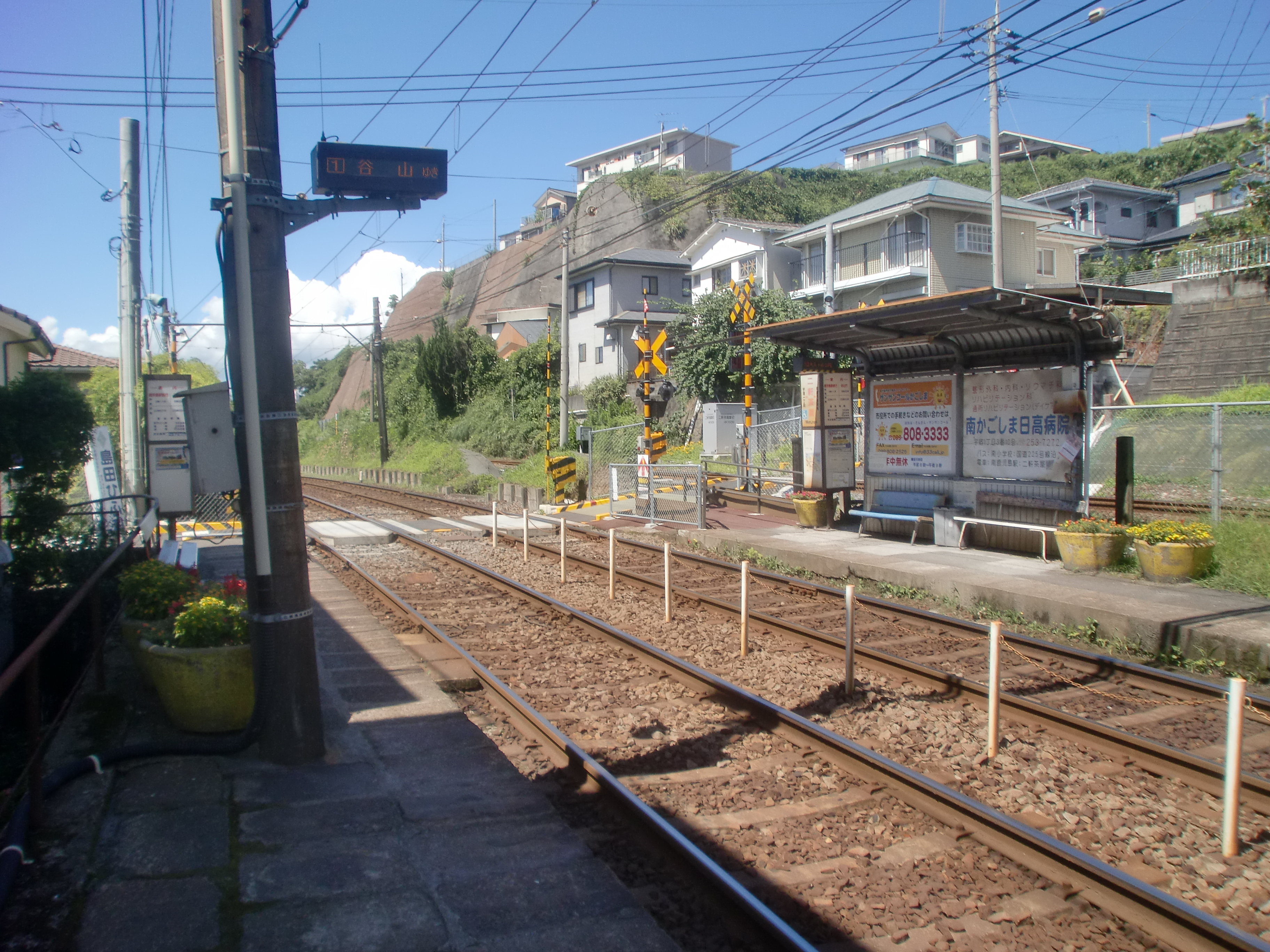 二軒茶屋電停の外観。